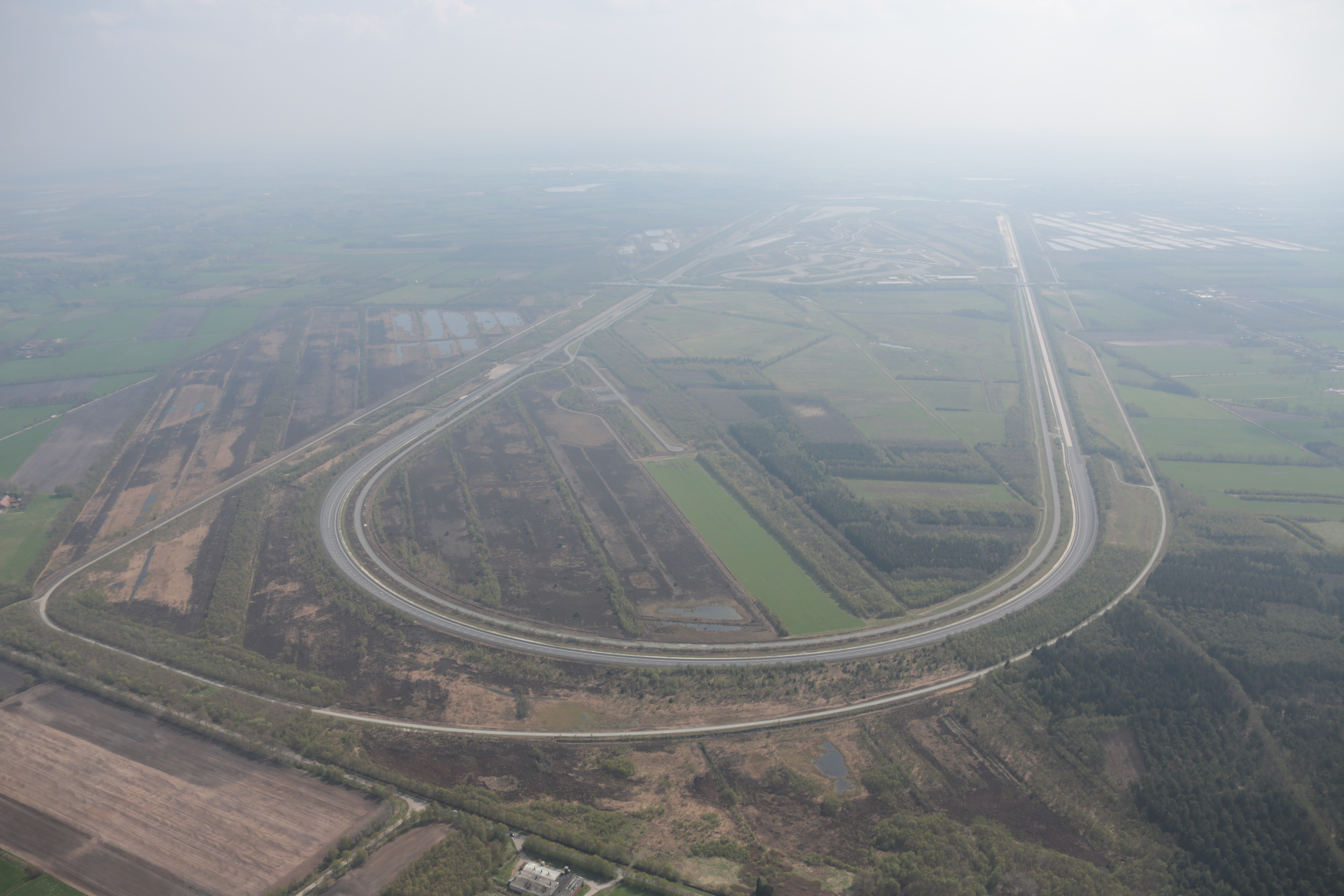 Fotoflug von Nordholz-Spieka nach Oldenburg und Papenburg: Automotive Testing Papenburg This photo was taken by Alchemist-hp. If you use one of my photos, an email (account needed) or a message or direct to: my email account would be greatly appreciated. Please note the license terms. Other licensing terms can get discussed, too. This file is copyrighted and has been released under a license which is incompatible with Facebook's licensing terms. It is not permitted to upload this file to Facebook.